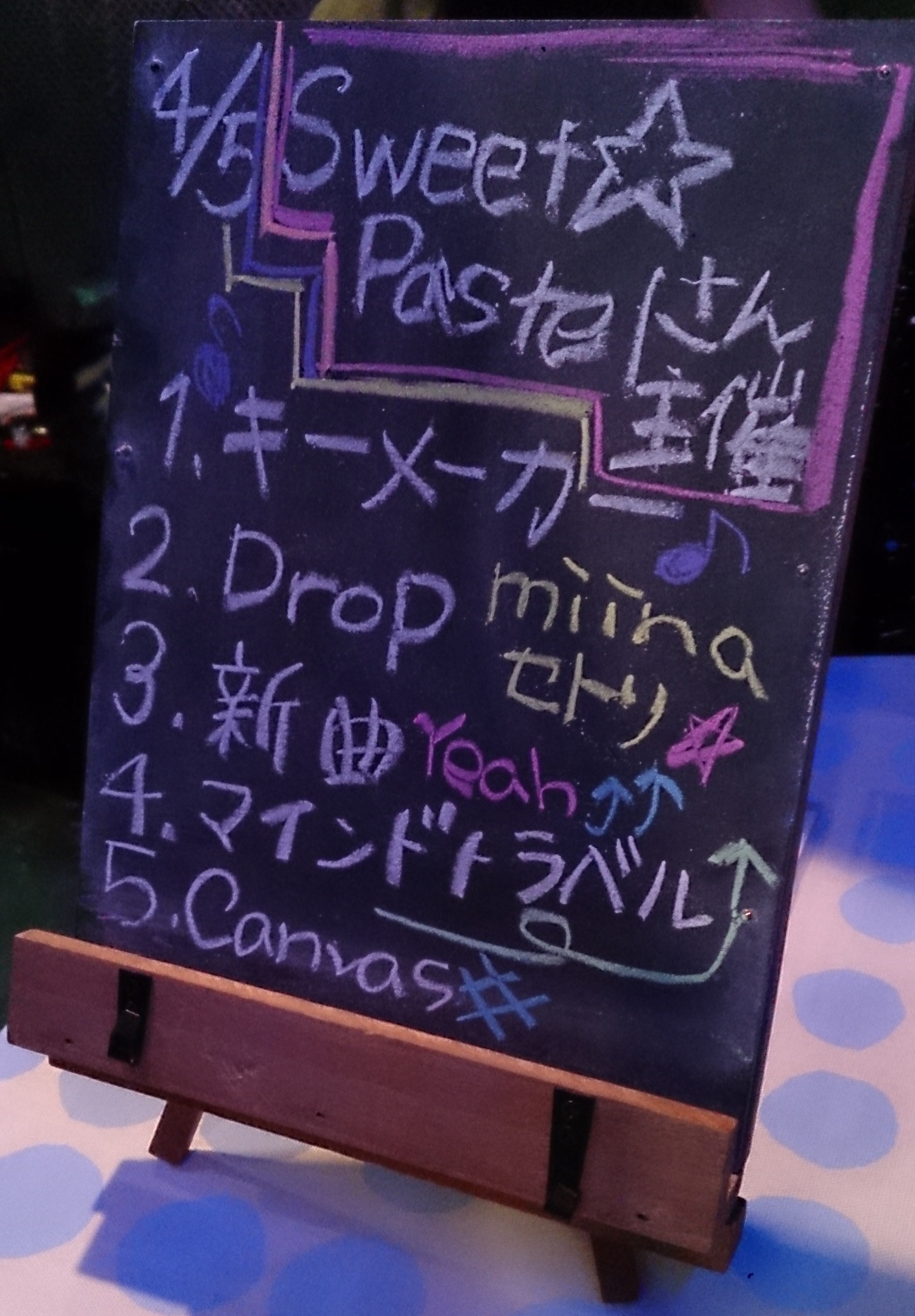 amiinaセトリボード(20150405(1))